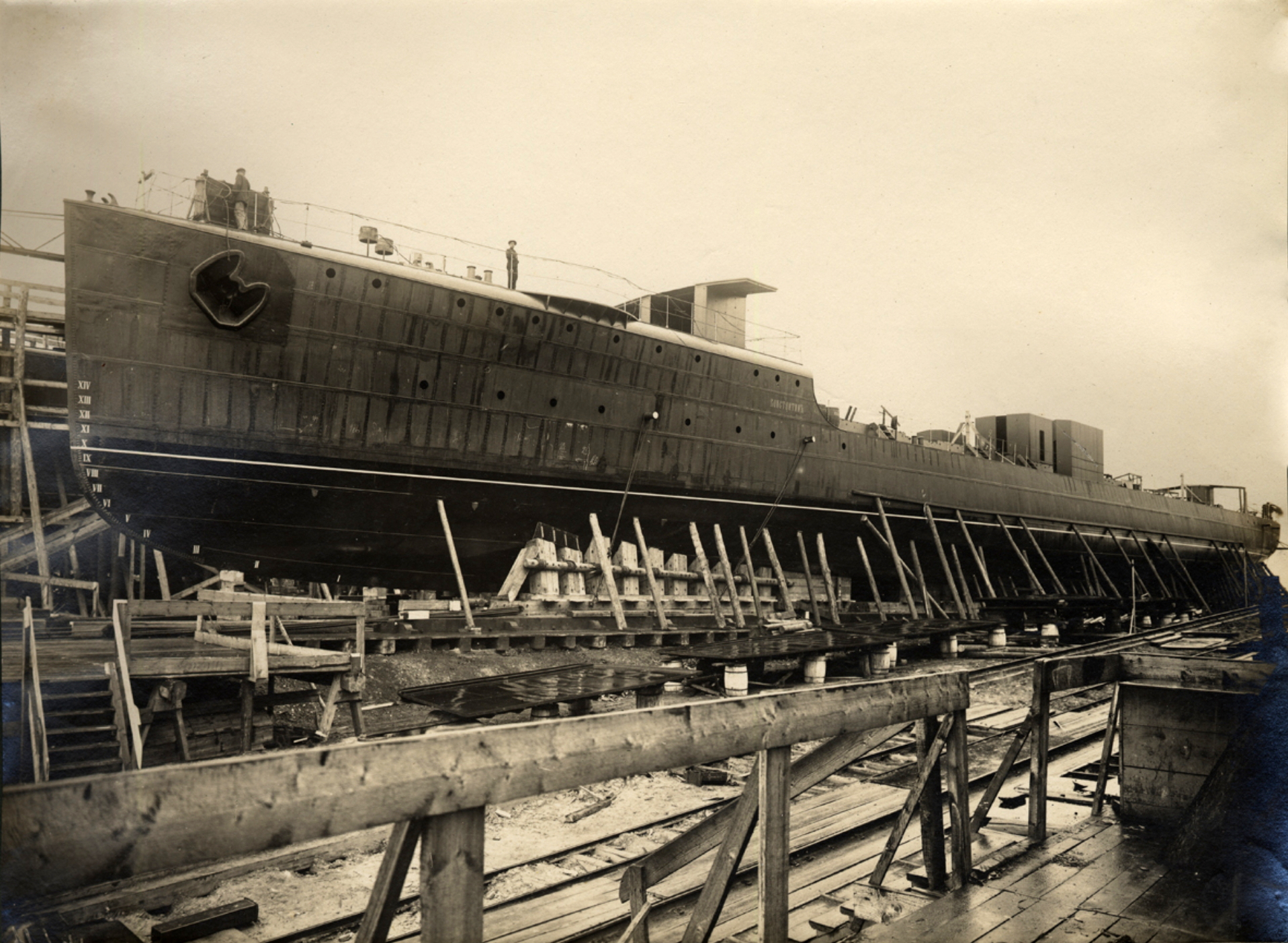 Miiniristleja Konstantin enne veeskamist Vene-Balti laevatehases